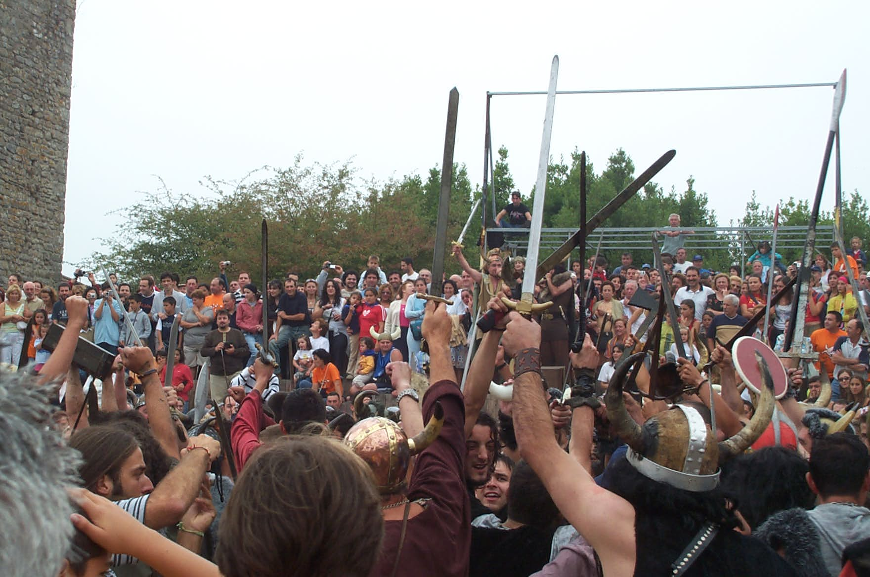 Romaría viquinga en Catoira, Galiza Vikingos festejando la victoria. Fiesta Vikinga en Catoria. Foto de la fiesta del desembarco vikingo en Catoira.